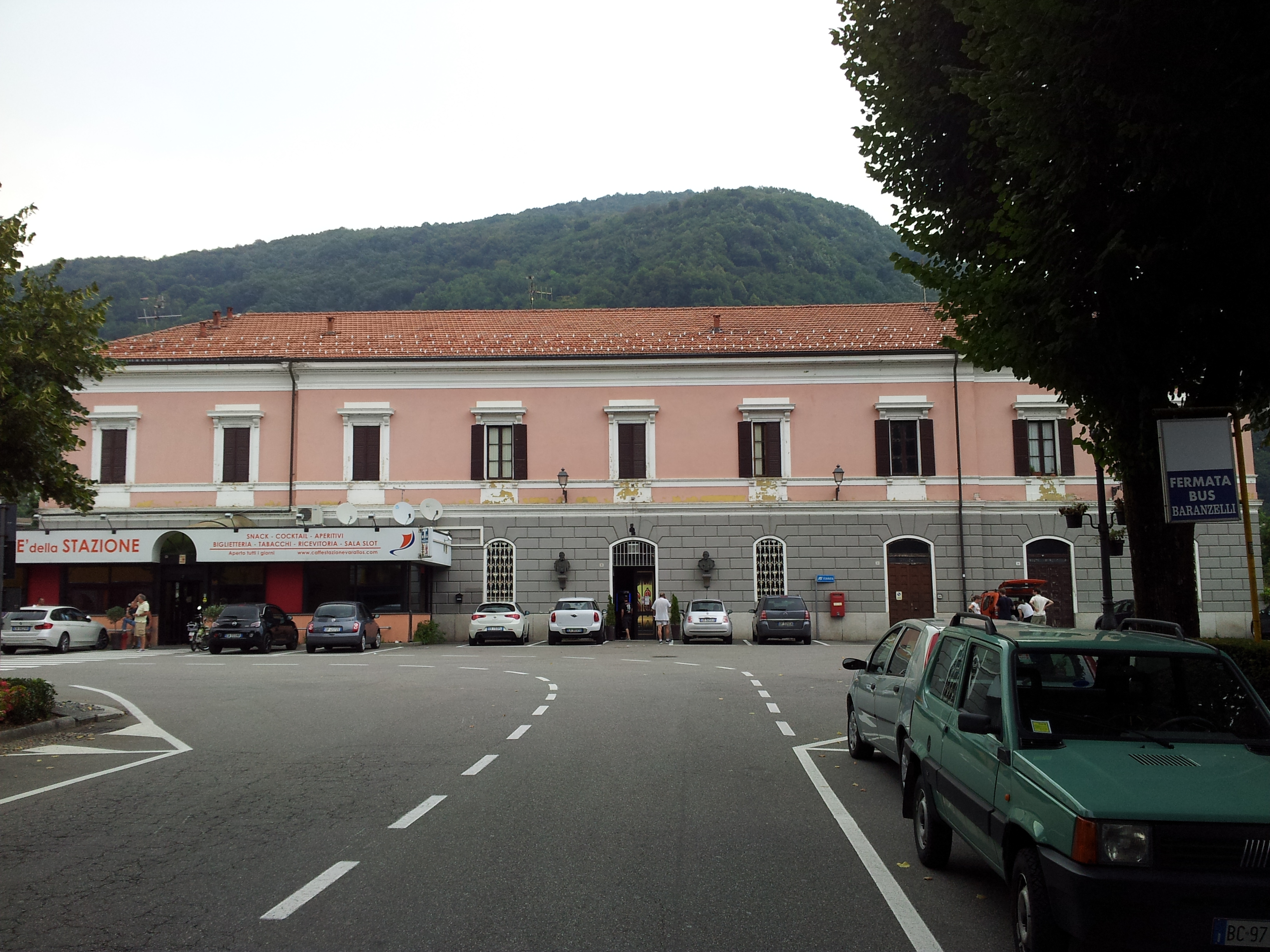 Stazione lato strada.